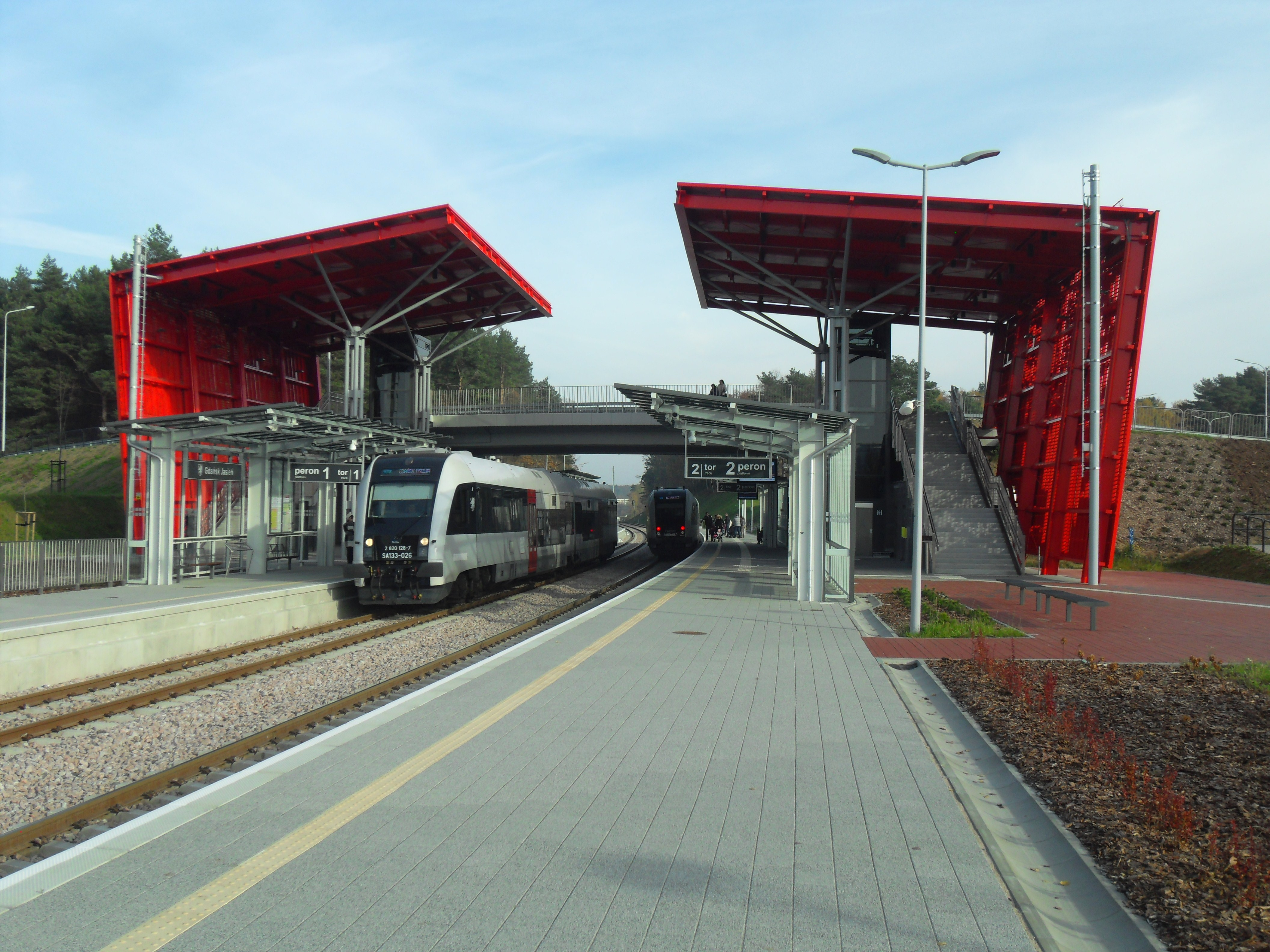 Przystanek Pomorskiej Kolei Metropolitalnej (PKM) Gdańsk Jasień i SA133-026.